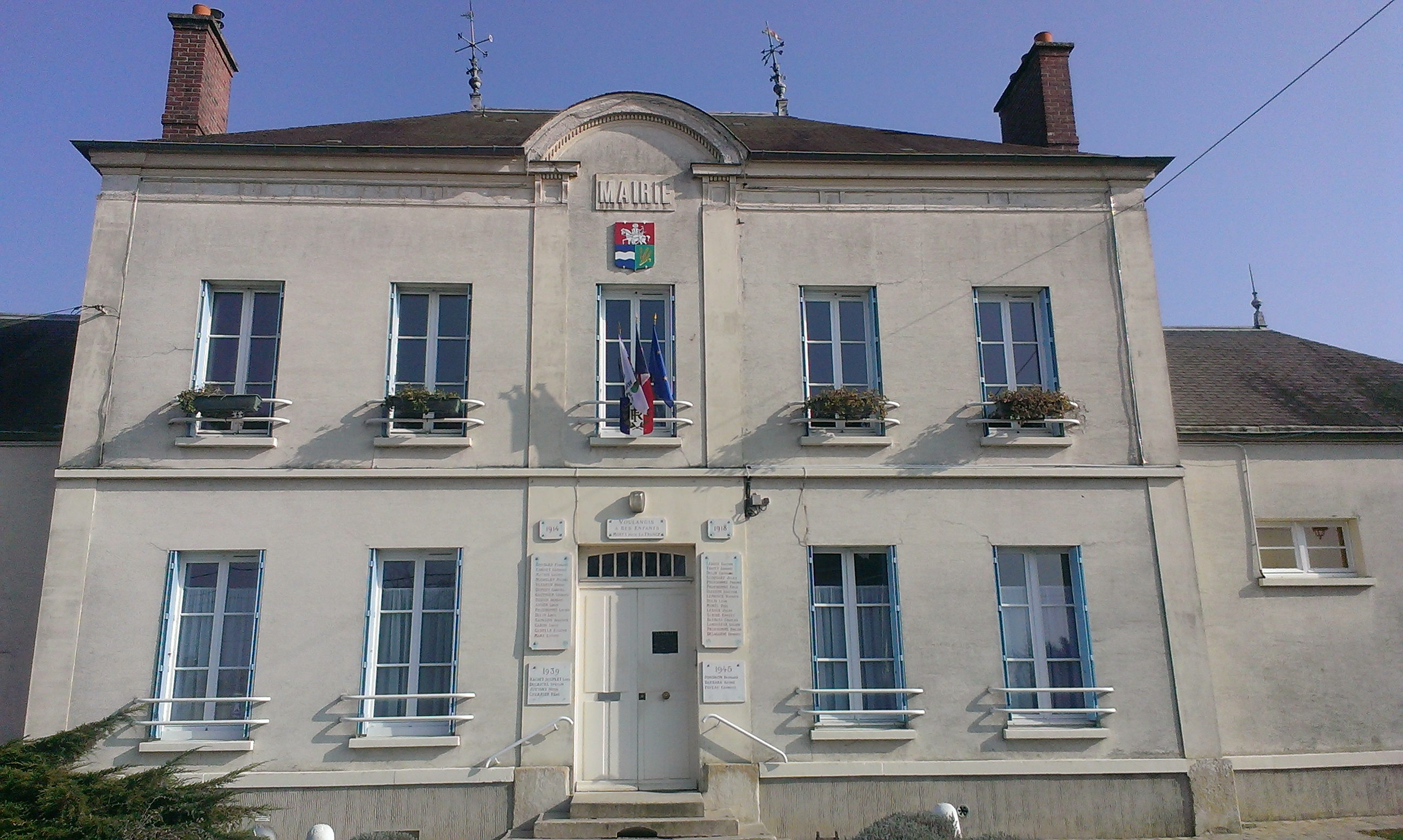 Mairie de Voulangis (77)